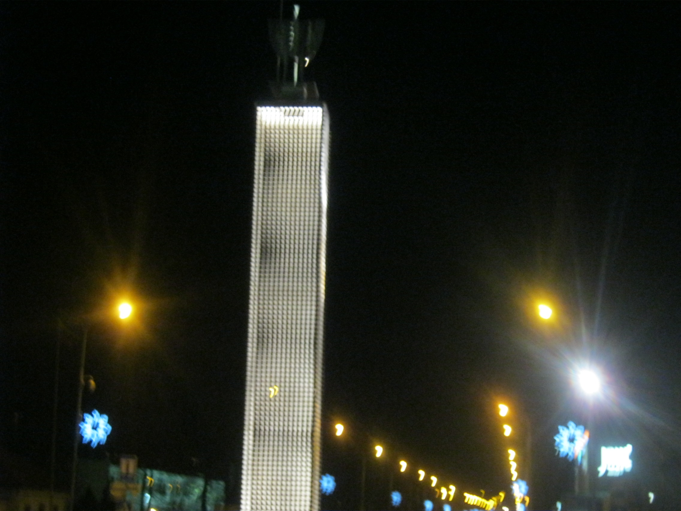 Jonava